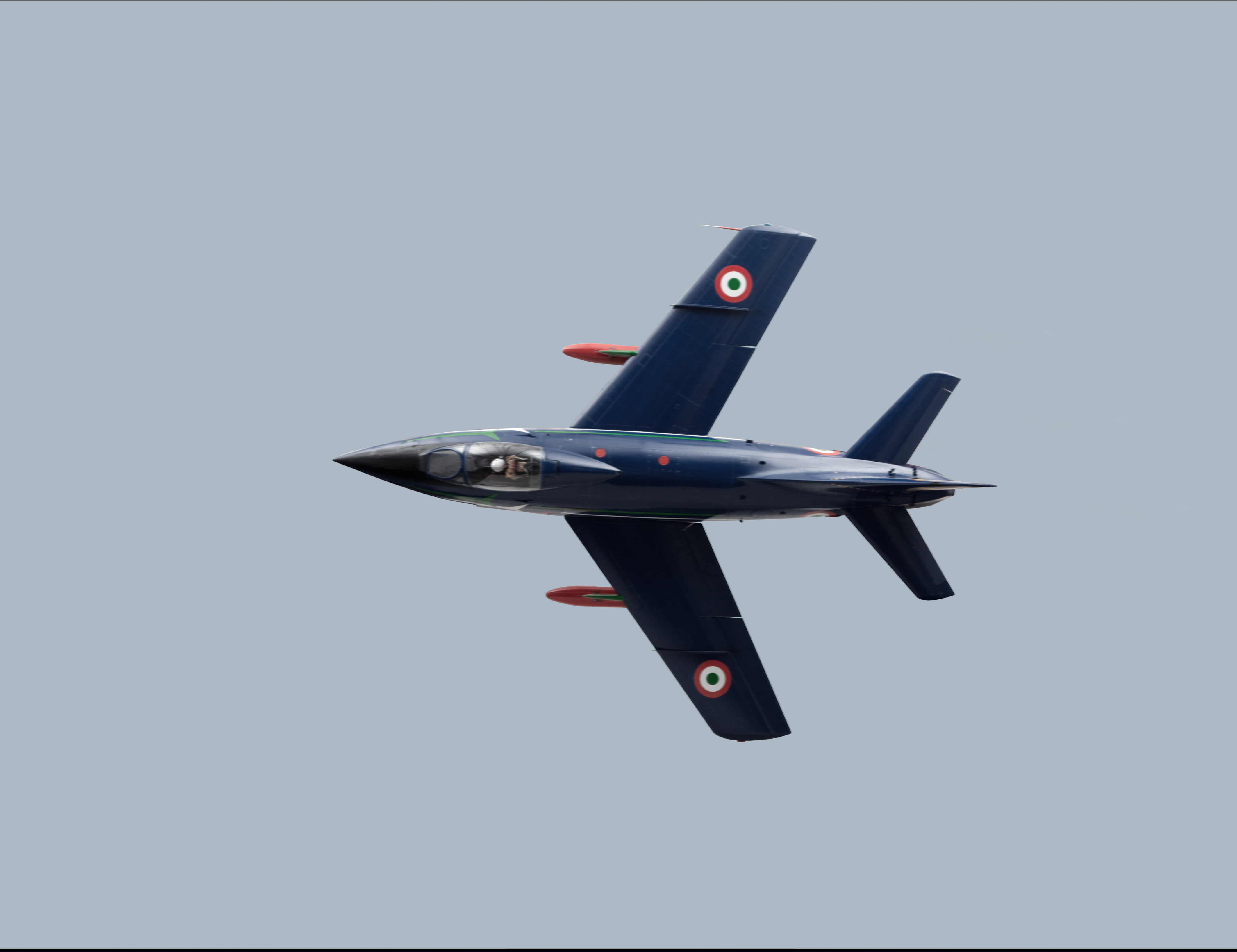 Un esemplare dell'aeromodello nei cieli di Malo G.91 PAN in volo